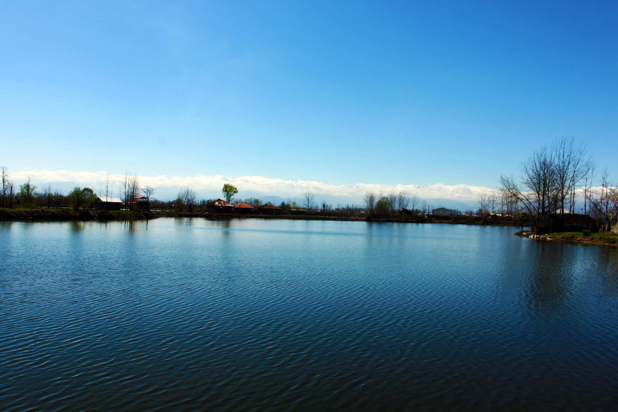 تالاب عینک رشت